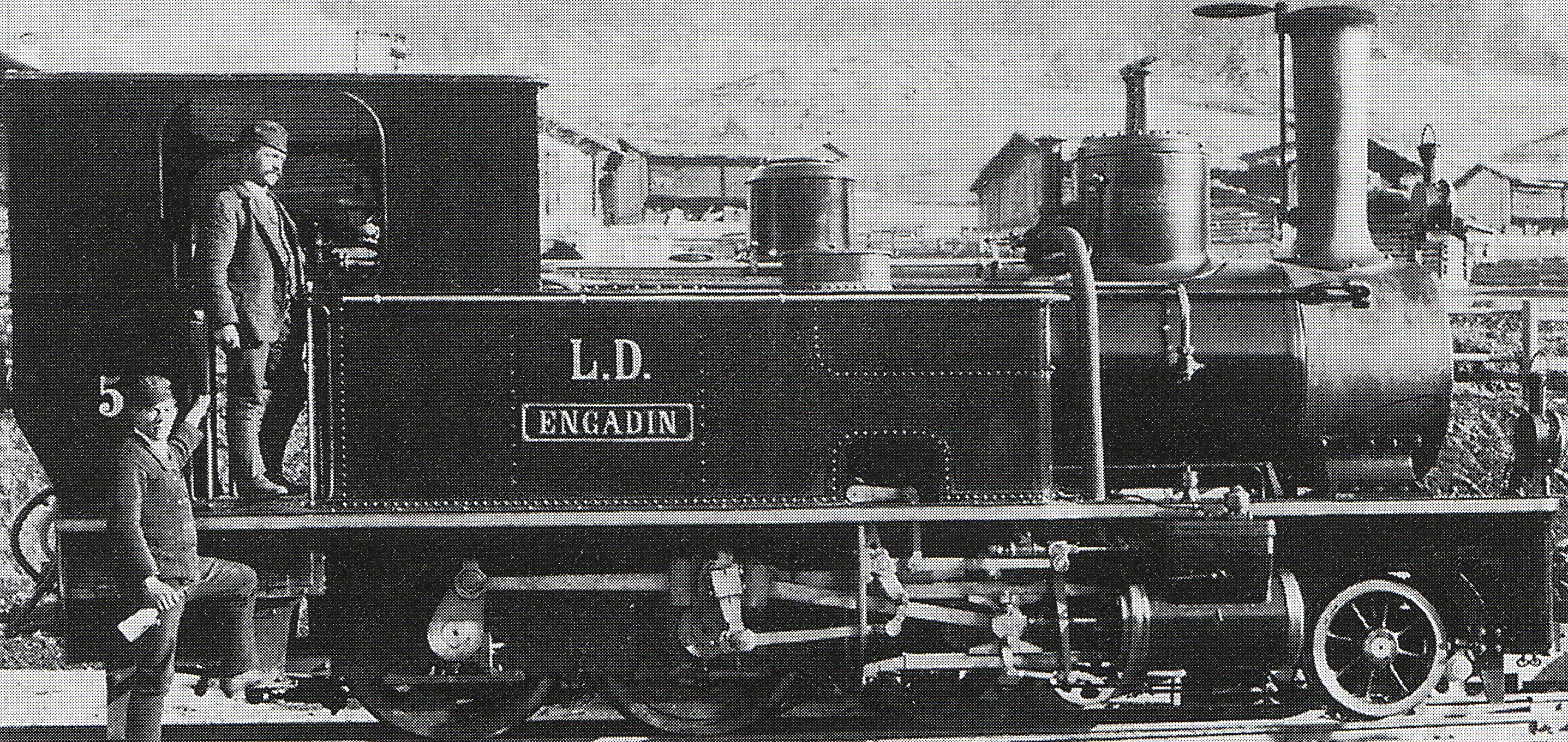 Tender-Lokomotive G3 Nr. 5 Engadin der Landquart-Davos-Bahn, gebaut 1889 in der Schweizerischen Locomotiv- und Machines-Fabrique in Winterthur (Fabr.-Nr. 581), 1895 von der Rhätischen Bahn übernommen, 1917 als Nr. 55 an die Luxemburger Prinz-Heinrich-Eisenbahn, 1943 als Nr. 99.273 an die Deutsche Reichsbahn, 1945 als Nr. 353 an die Luxemburgische Nationalbahn, 1954 außer Dienst gestellt und anschließend abgebrochen.